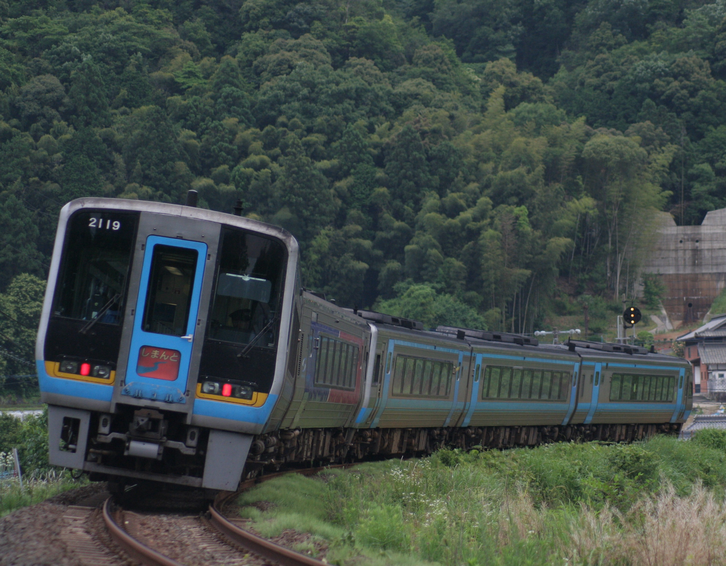 JR四国2000系気動車 特急しまんと 土讃線、讃岐財田 - 黒川